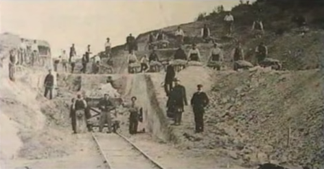 Obras del FCCH